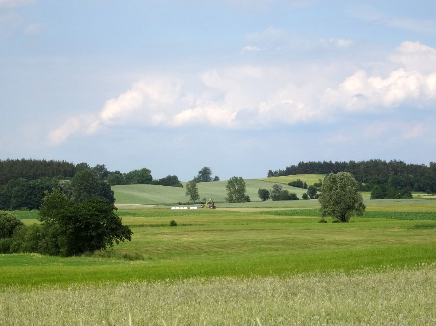 Pojezierze Krajeńskie, pofałdowany krajobraz młodoglacjalny okolic Więcborka